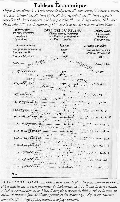 "Tableau Économique" (eine schematische Darstellung der Volkswirtschaft) des französischen Ökonomen Francois Quesnay (1694-1774)